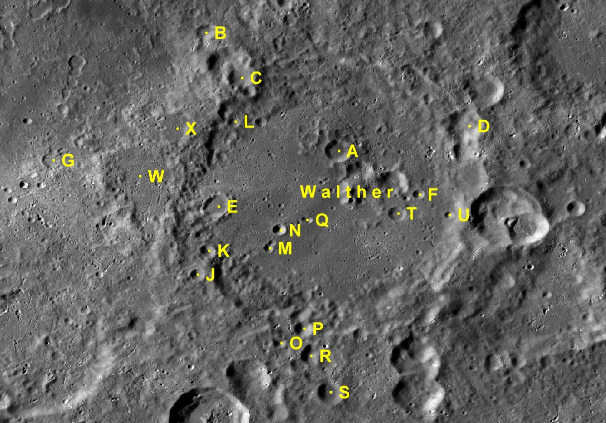 Cráter lunar Walther. Cráteres satélite. (Imagen LRO)